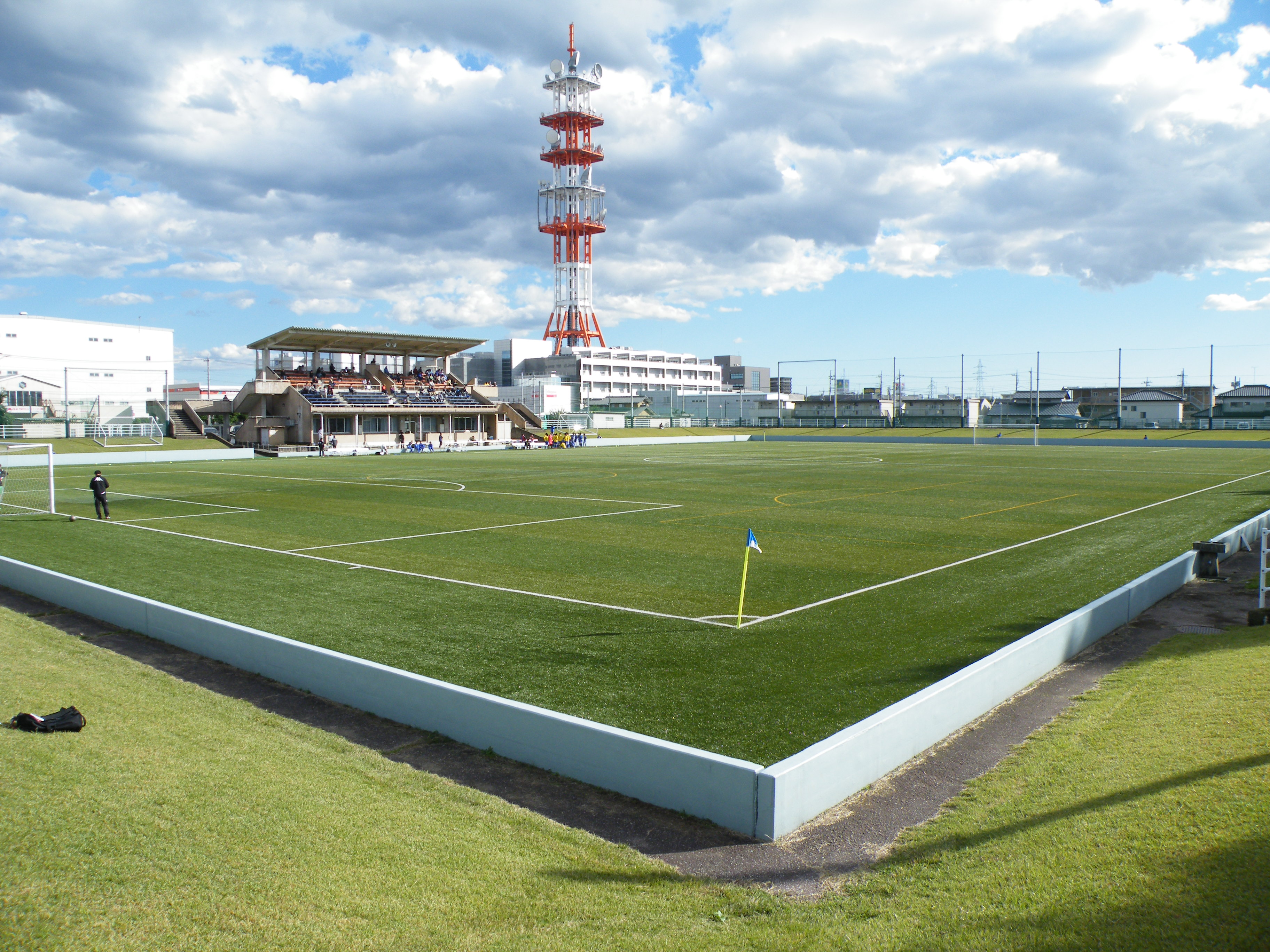 宇都宮市サッカー場。アウェイゴール裏バック側コーナー付近の芝生スタンドより撮影。